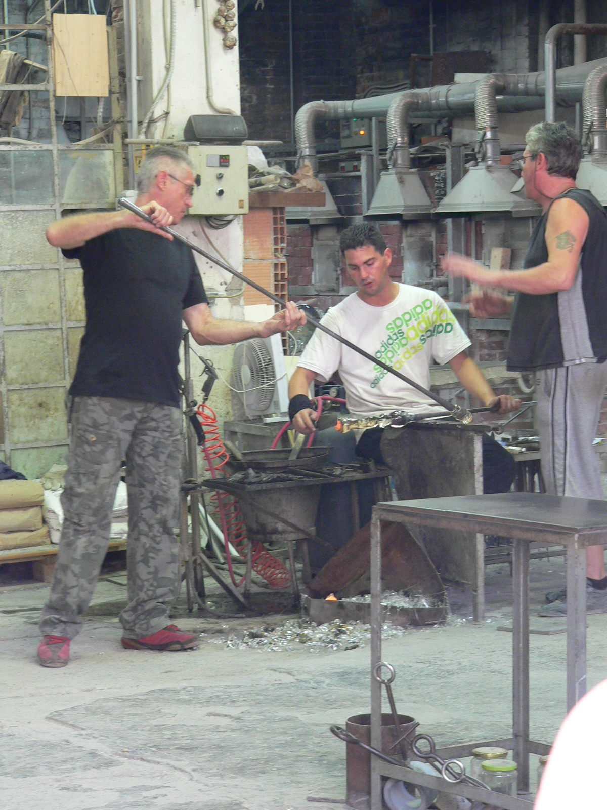 Murano, üvegfúvó műhely – bemutató